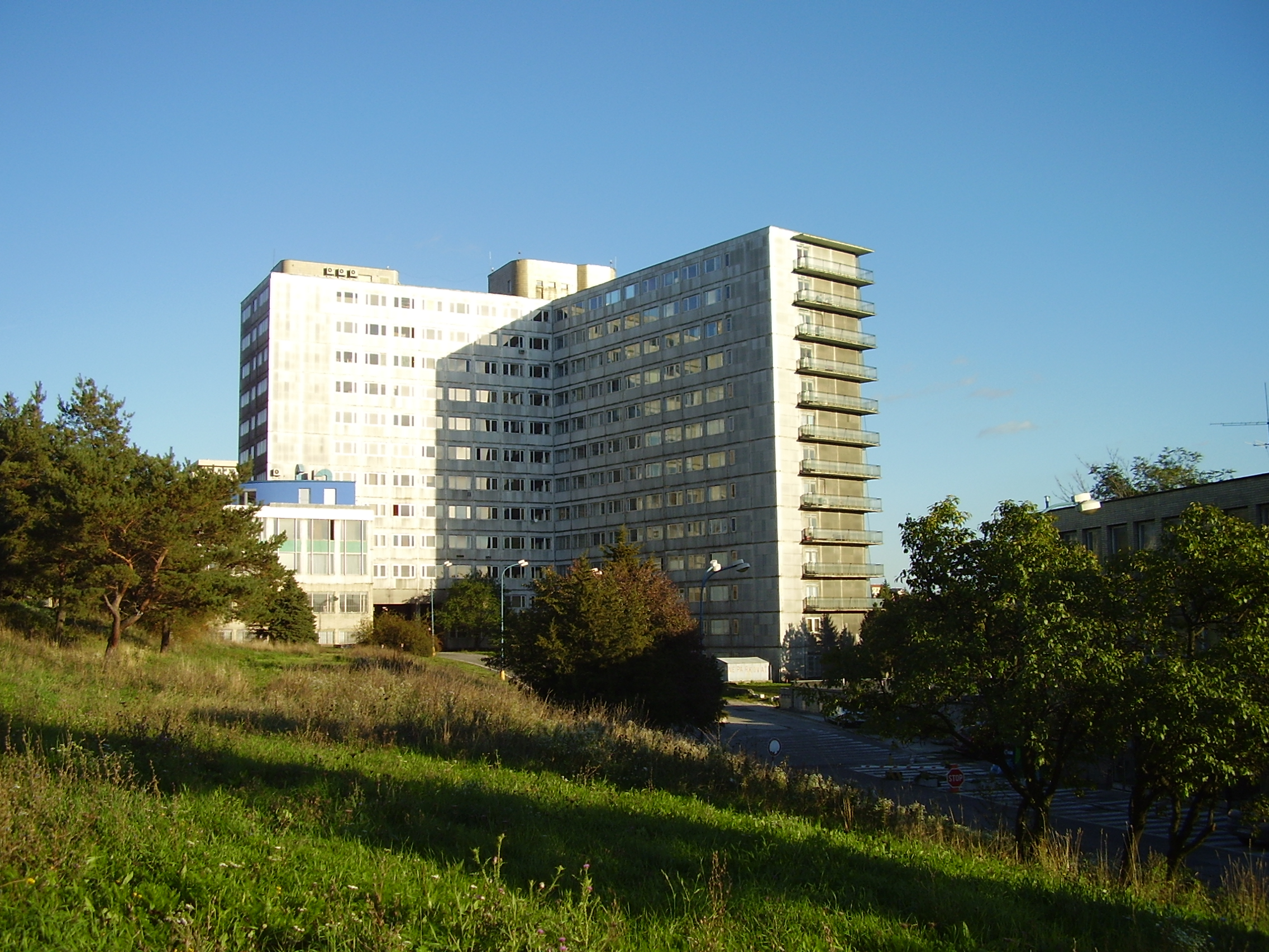 Hospital in Kramáre, Bratislava